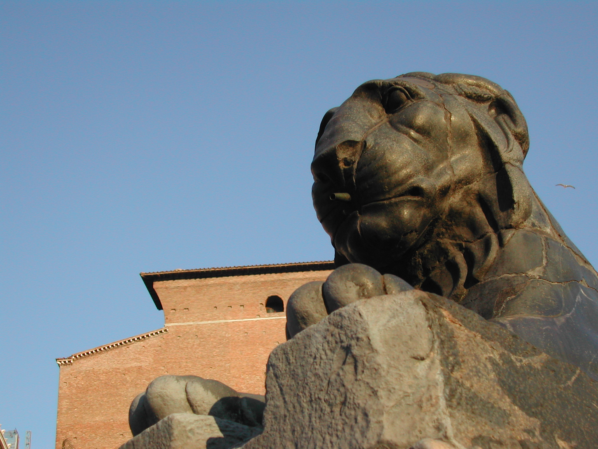 Roma, Cordonata a Campidoglio: Leone egizio (dietro, l'Aracoeli) by Lalupa - PD